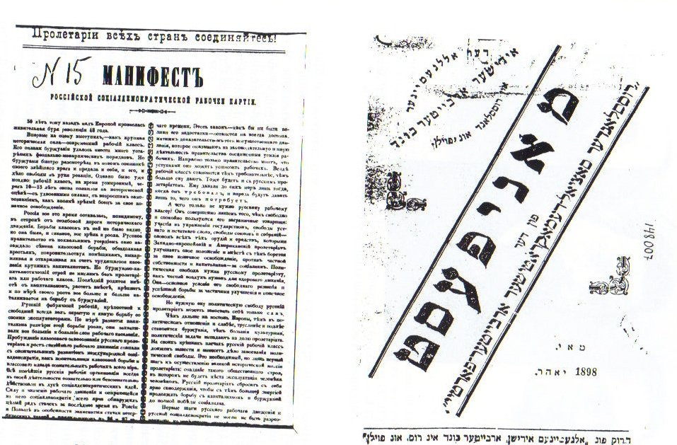 Газета 1898 года с манифестом РСДРП